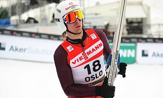 Witalij Szumbareć podczas serii treningowej przed konkursem indywidualnym mężczyzn na Mistrzostwach Świata w Narciarstwie Klasycznym 2011 w Oslo.